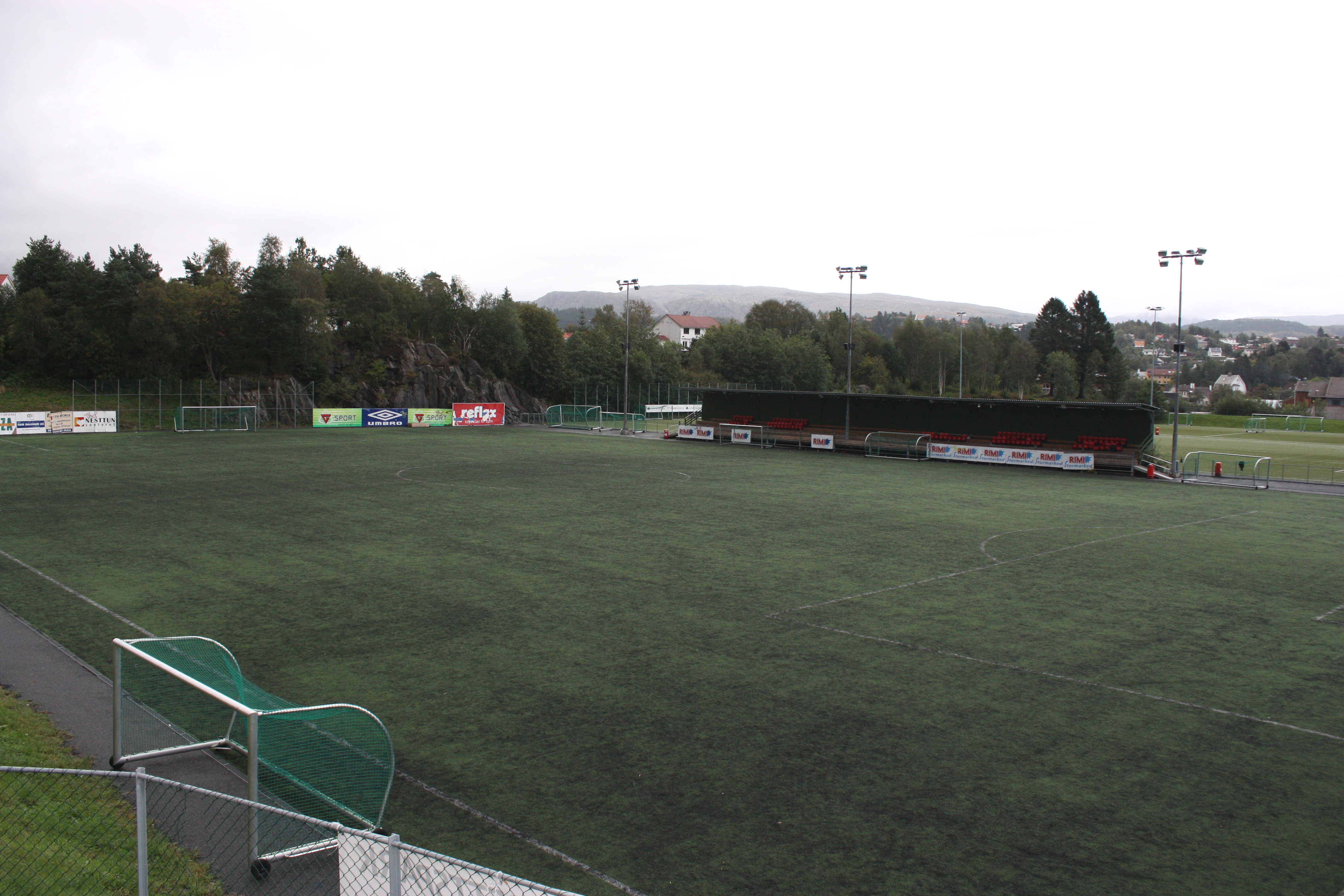 Nesttun Idrettsplass, Fana, Bergen.